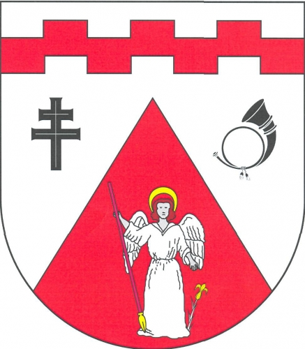 znak, Chlístov, okres Třebíč